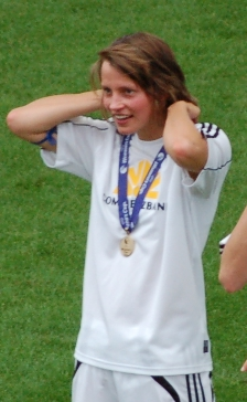 Sarah Günther